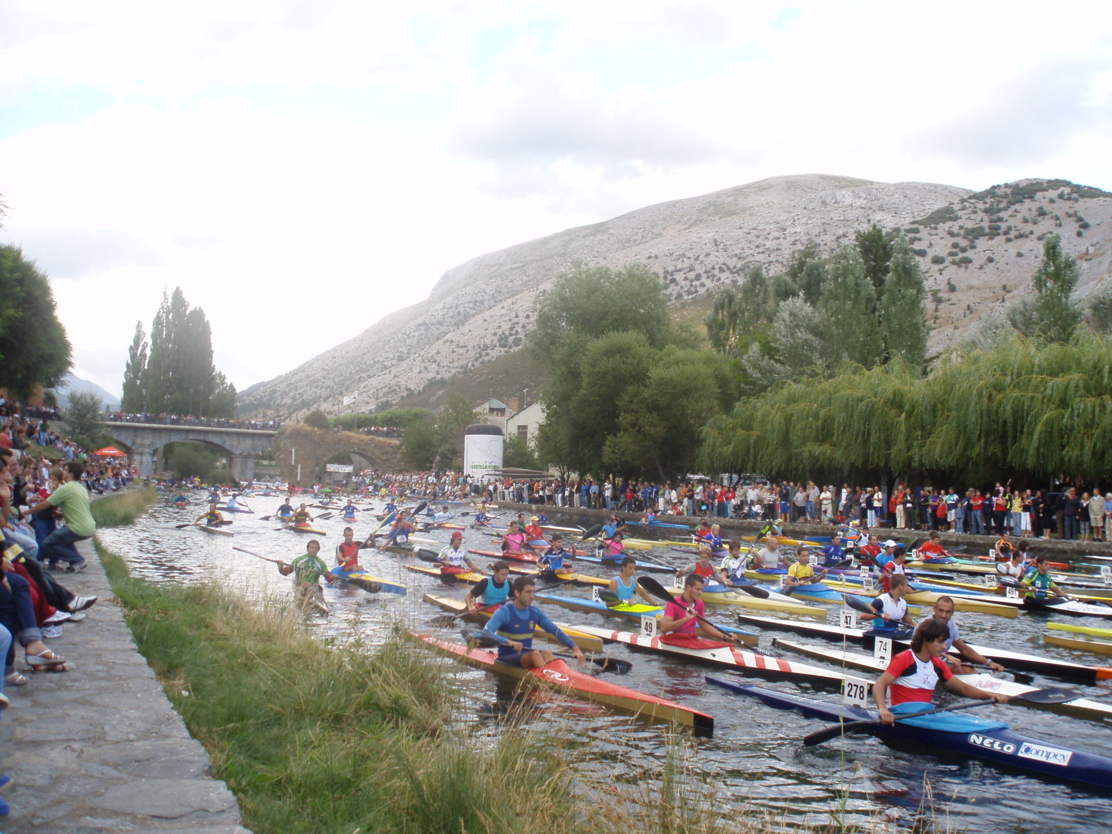 Salida del Descenso Internacional del Carrión en Velilla del Río Carrión (Palencia, Castilla y León).